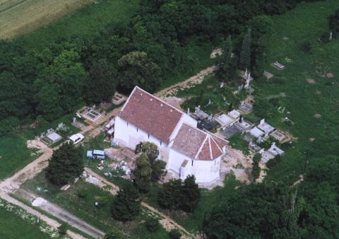 Szenyér, Hungary, aerialphotography. Szent Péter és Pál római katolikus templom